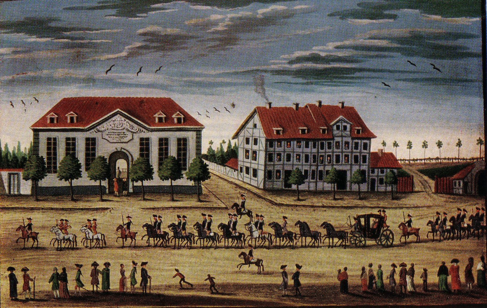 Comitat vor dem Universitätsreitstall in Göttingen. Stammbuchblatt aus dem Jahre 1765. Anmerkung: Dieses in der Literatur als Comitat beschriebene Stammbuchblatt ist nach Reitrichtung und Gebäuden, dem Reitstall an der Weender Straße, eigentlich eine feierliche Einholung, also das Gegenteil. Jedoch sind Ablauf und Formation im Wesentlichen gleich. Dargestellt ist vermutlich die Einholung durch die Studentenschaft beim Besuch des Herzogs von York am 22. August 1765 in Göttingen. Siehe auch den Bericht des Seniors der Hannoverschen Landsmannschaft Ernst Ludwig Julius von Lenthe über den Ablauf nebst Liste der Teilnehmer in der Handschriftenabteilung der SUB Göttingen.